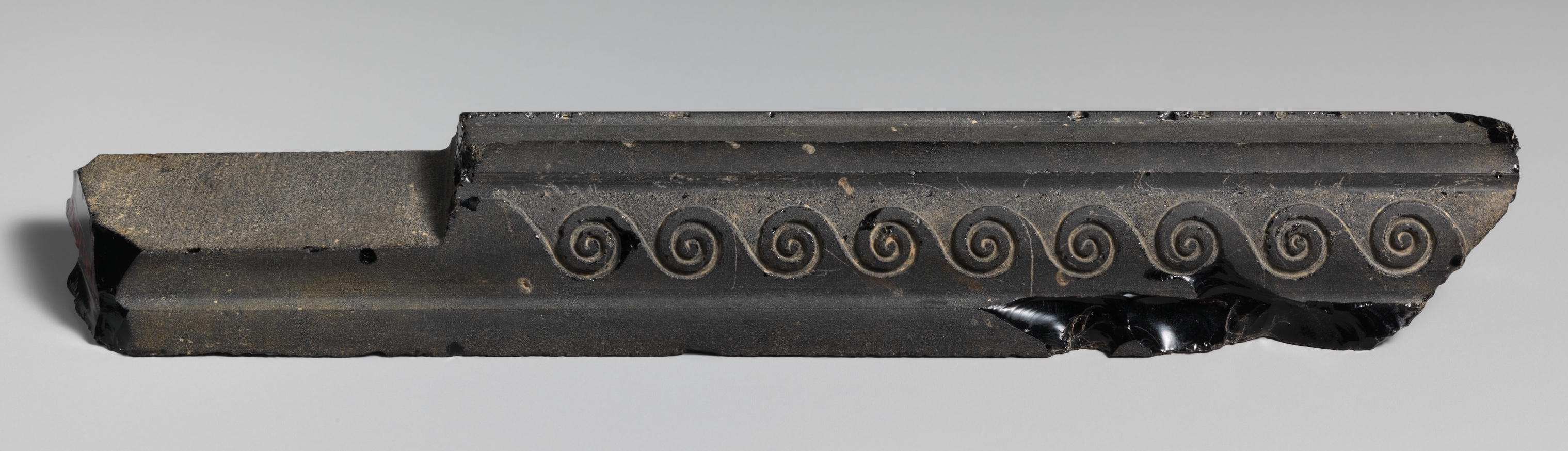 Roman; Furniture attachment (?); Glass